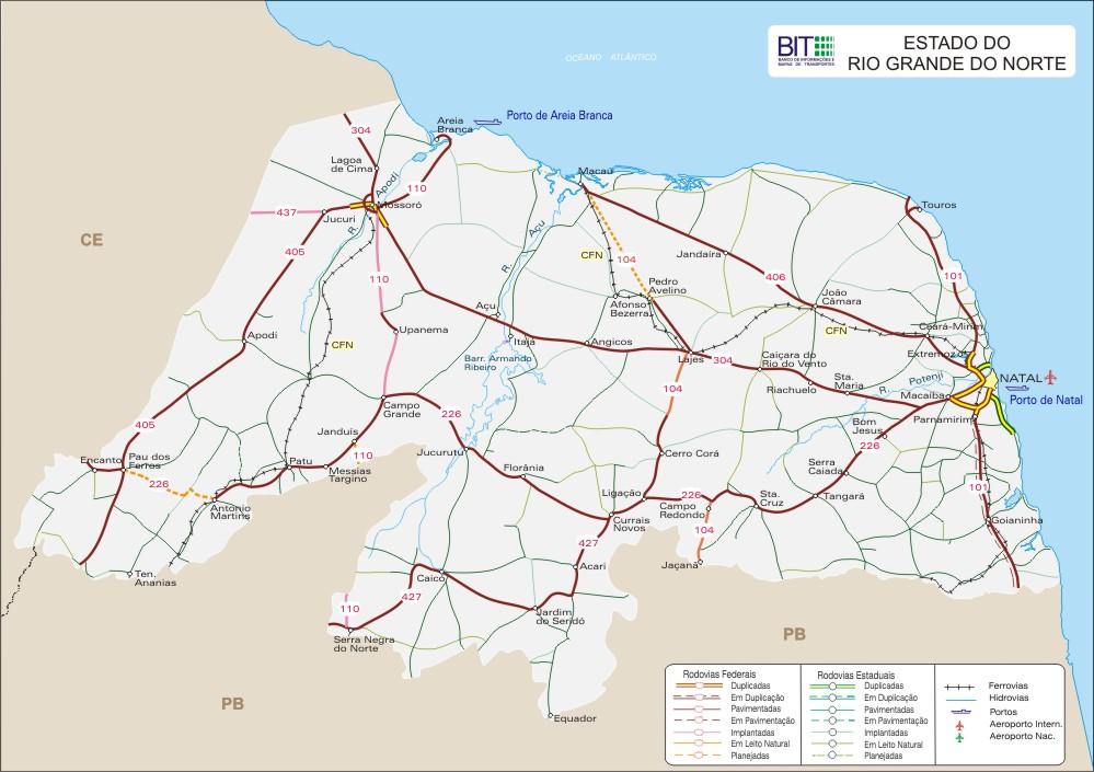 Mapa de transportes no Rio Grande do Norte.